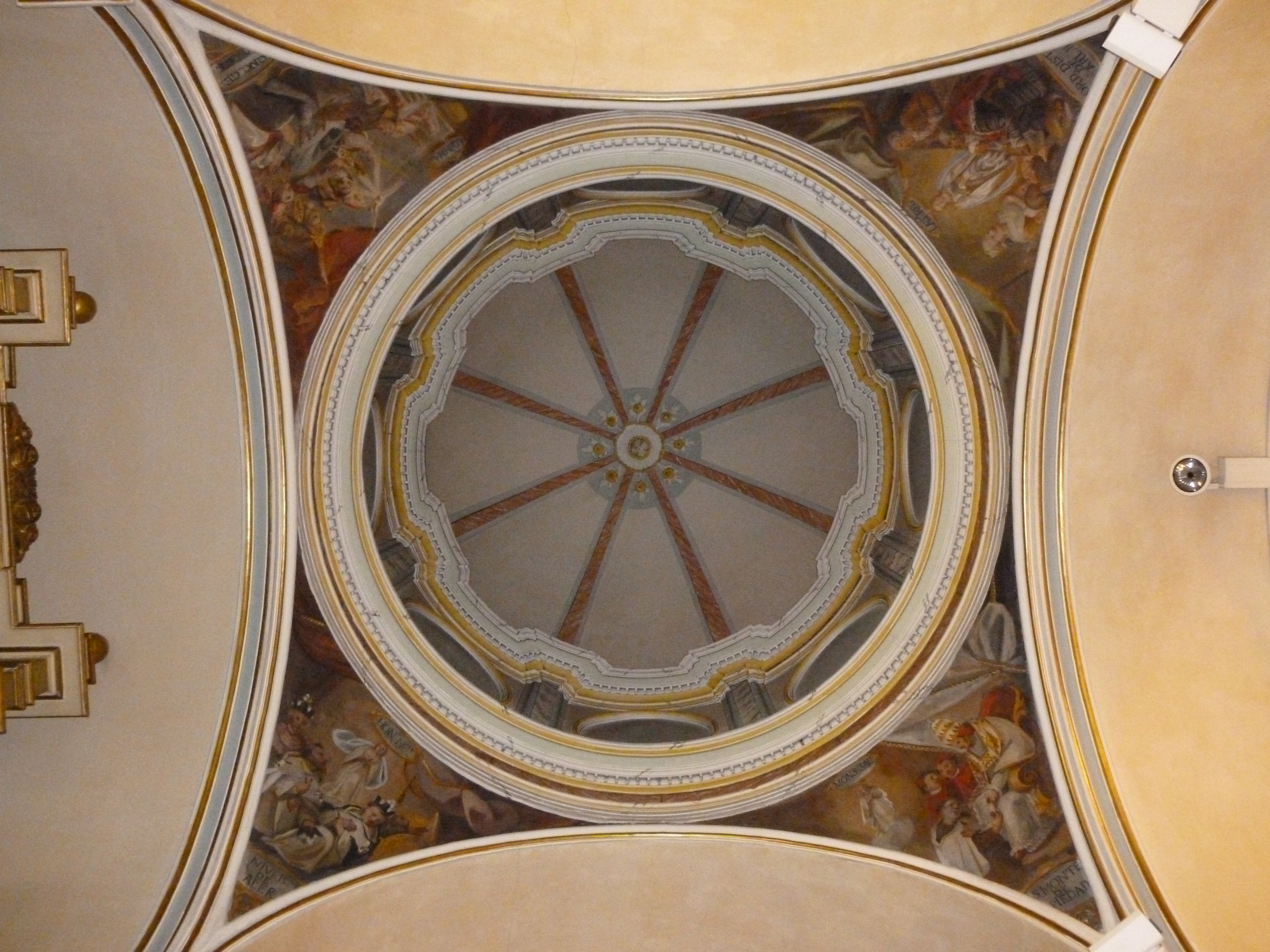 Petxines referides al misteri de la Immaculada Concepció (ca. 1769) de Josep Vergara Ximeno. Frescs situats a la cúpula de la capella de la Immaculada Concepció, a l'església del Sant Àngel Custodi de la Vall d'Uixó (Plana Baixa)